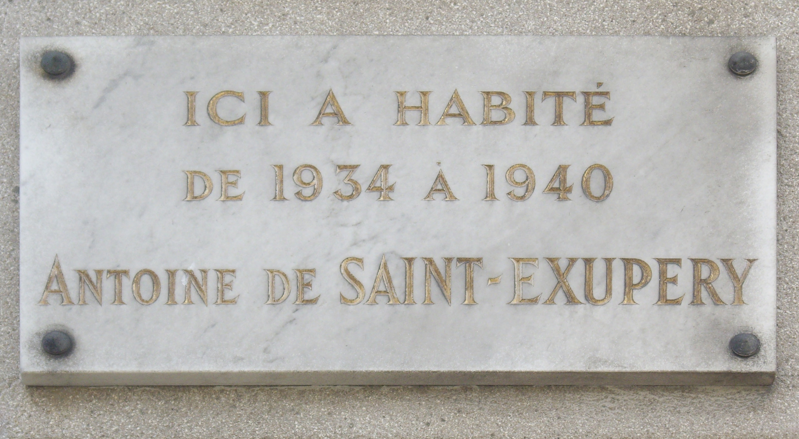 Plaque apposée avenue de Tourville, à l'angle du n° 15 de la place Vauban, Paris 7e, où l'aviateur et écrivain Antoine de Saint-Exupéry (1900-1944) vécut de 1934 à 1940.